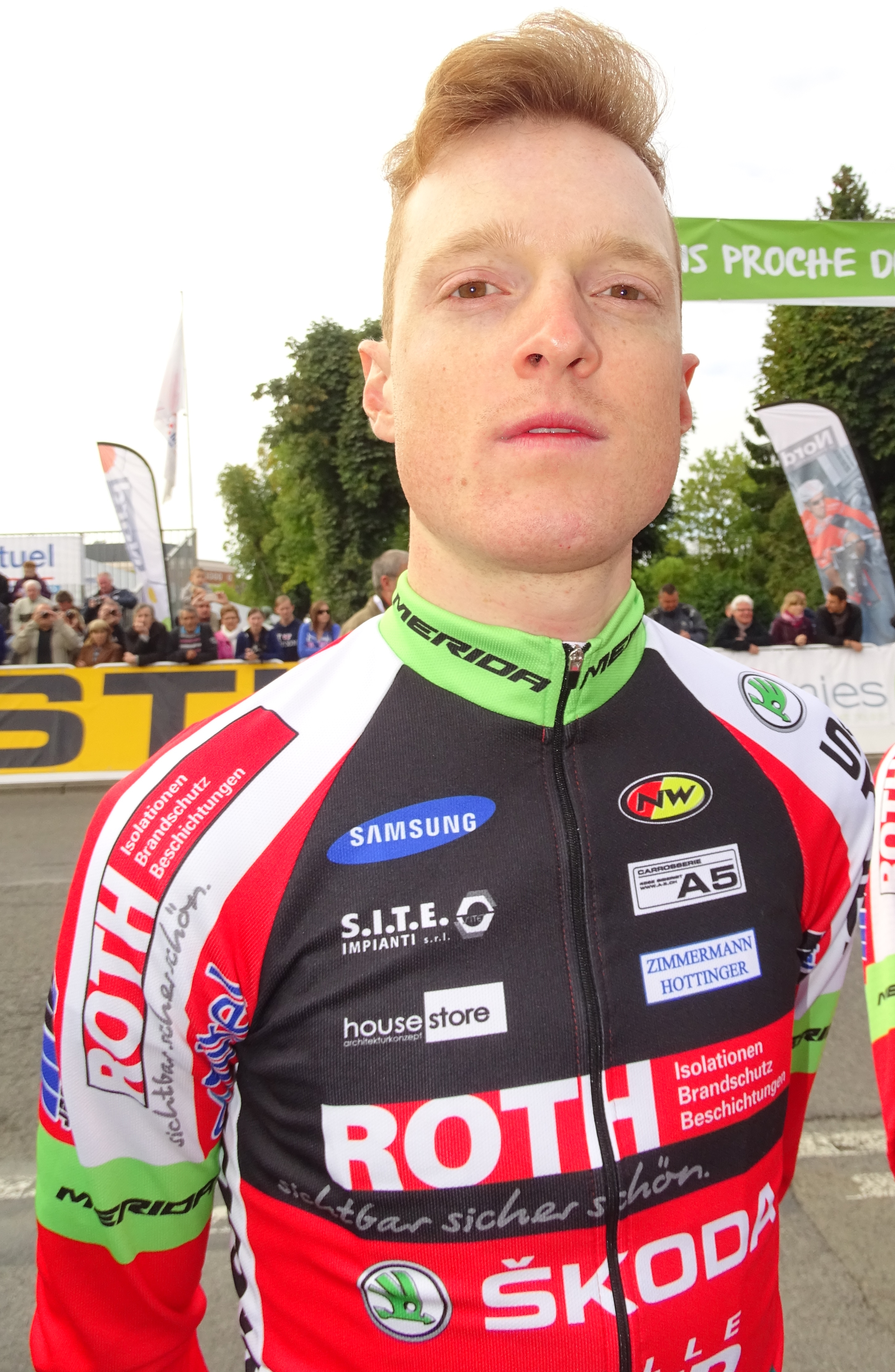 Reportage réalisé le dimanche 6 septembre à l'occasion du départ et de l'arrivée du Grand Prix de Fourmies 2015 à Fourmies, Nord-Pas-de-Calais, France.